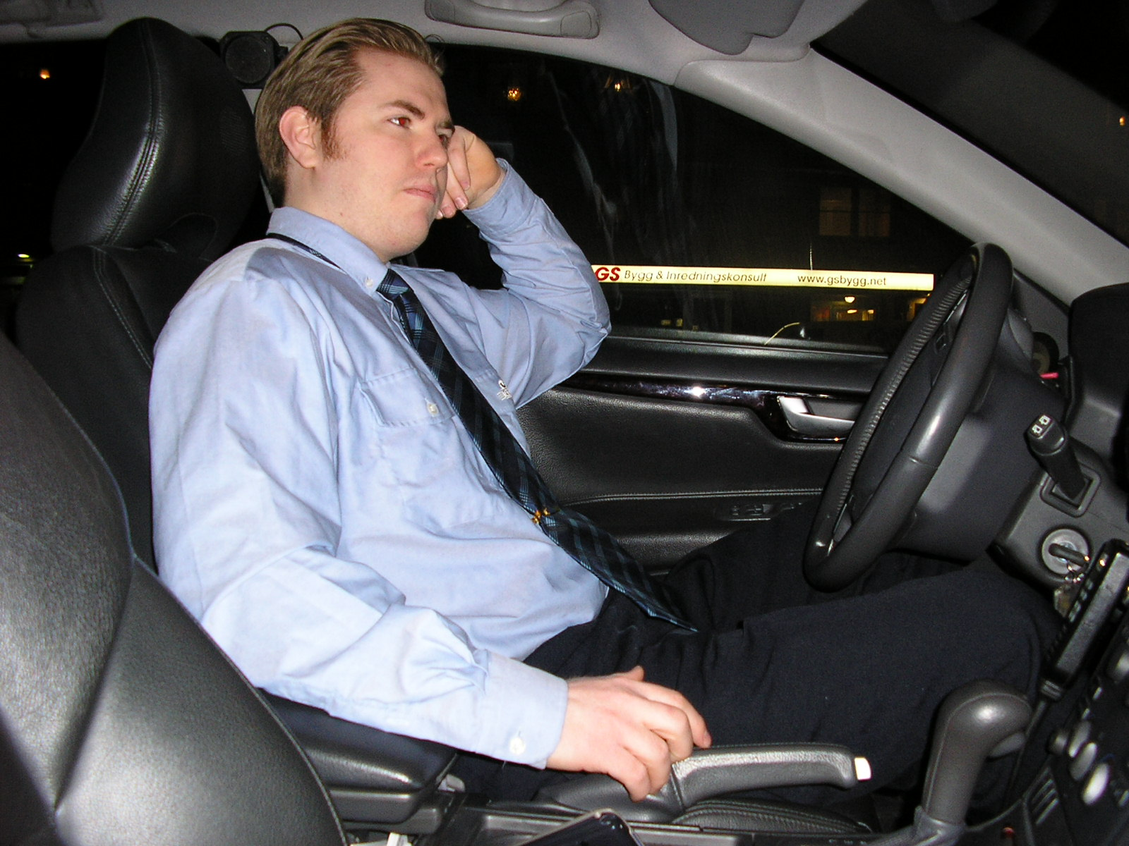 Taxichaufför på TaxiKurir